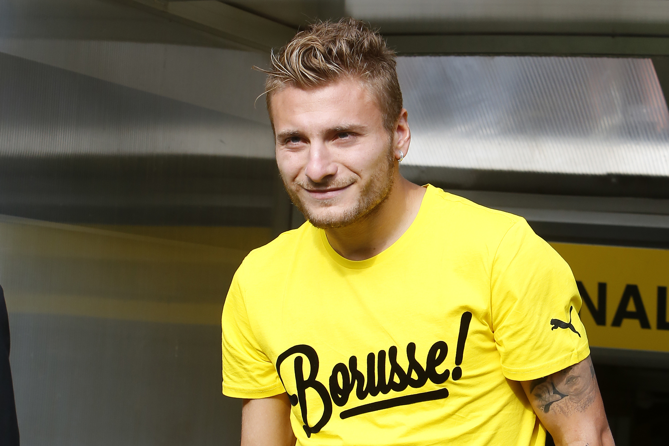 Ciro Immobile bei der Mannschaftsvorstellung am 09.08.2014 im Signal Iduna Park in Dortmund.